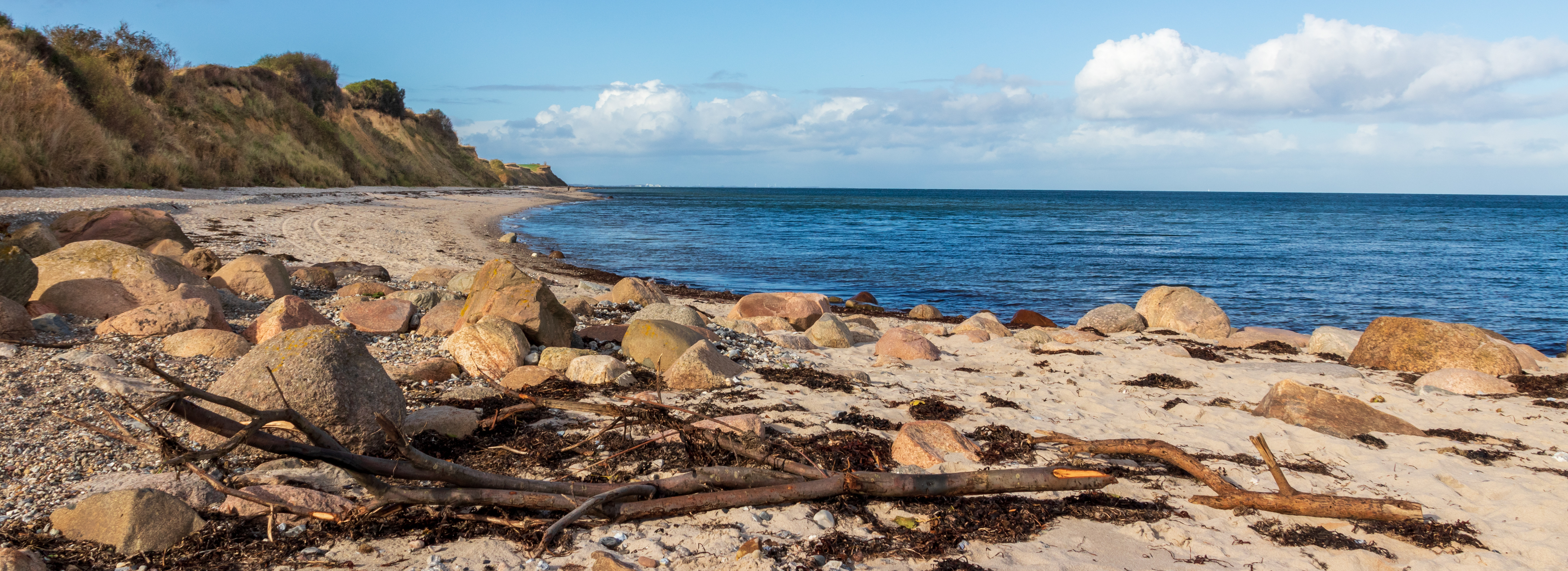 Steilküste bei Bülk im Landschaftsschutzgebiet Küstenlandschaft Dänischer Wohld